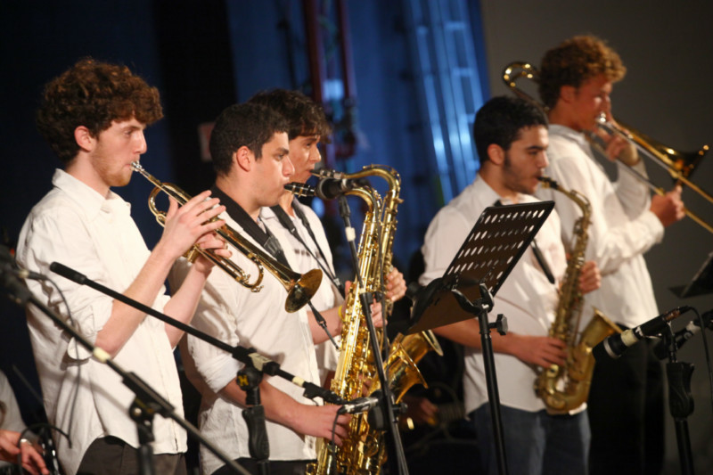 מגמת ג'אז – תיכון עירוני א' לאמנויות